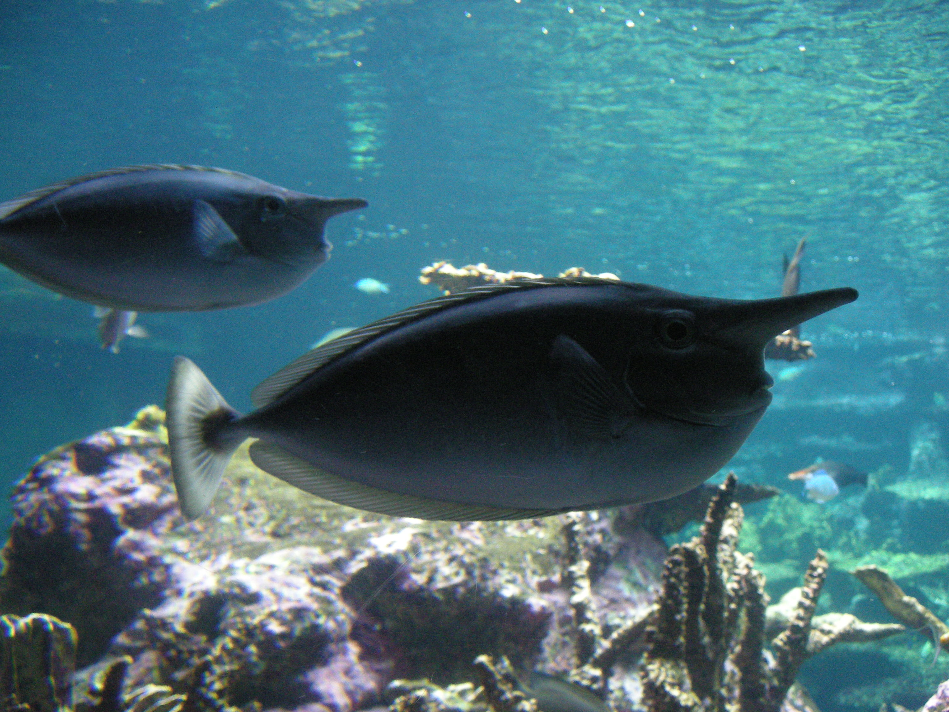 Aquarium de la Cité de la Mer à Cherbourg, Normandie